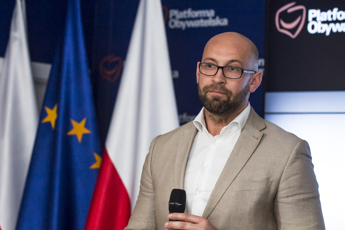 Warszawa, 21.05.2014